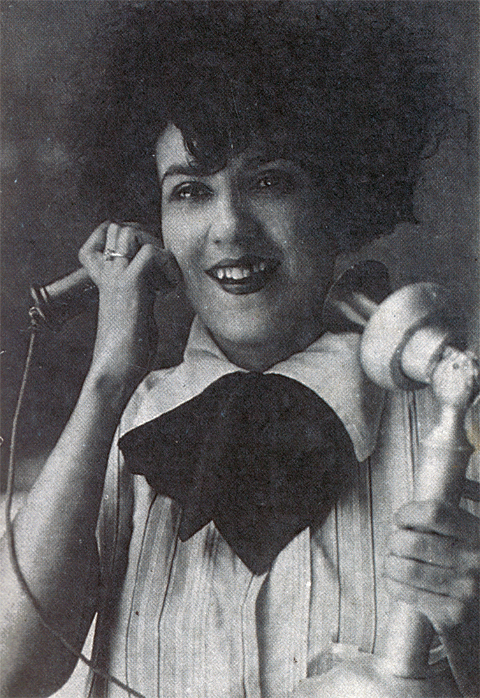 Alda Garrido